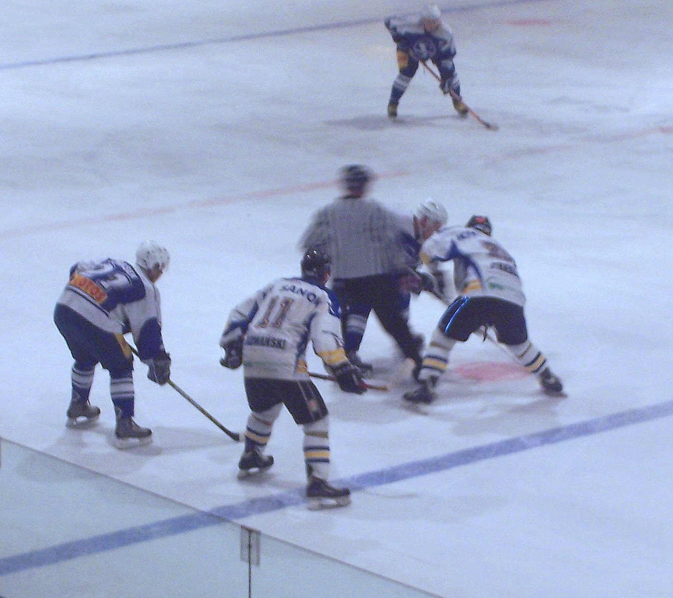 KH Sanok - Stoczniowcem Gdańsk (6:2) mecz 21 marca 2006 jako ostatnie oficjalne spotkanie hokeja na lodzie na lodowisku Torsan.